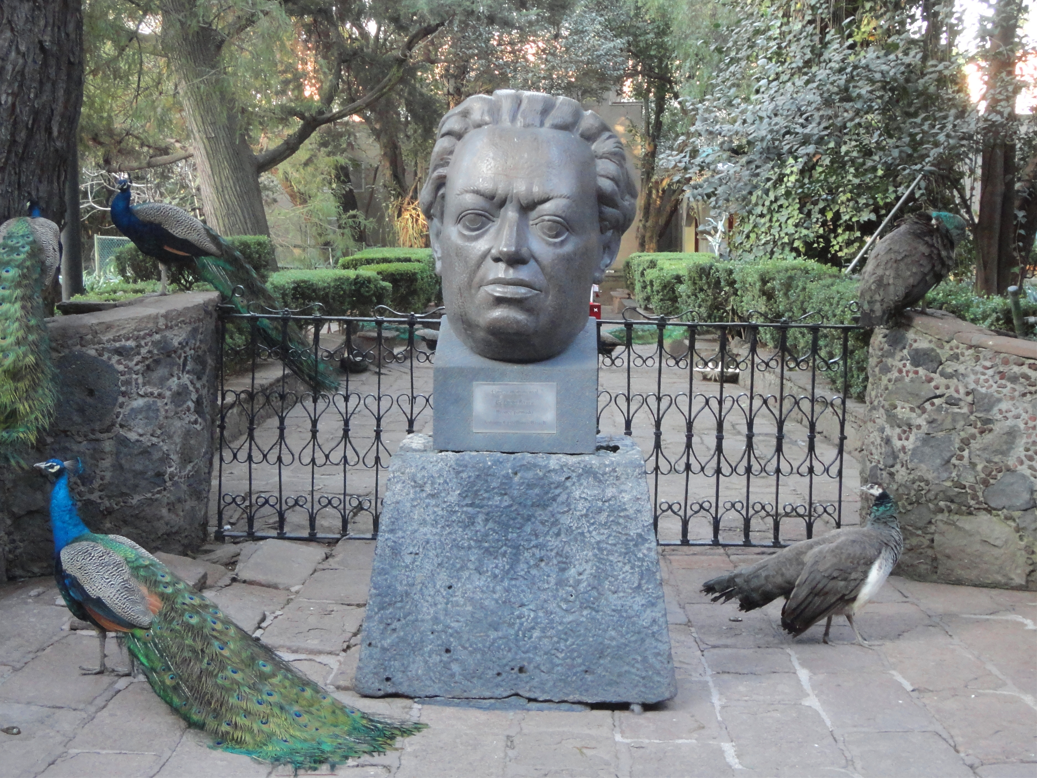 Monumento a Diego Rivera en Museo Dolores Olmedo, Ciudad de México, México.